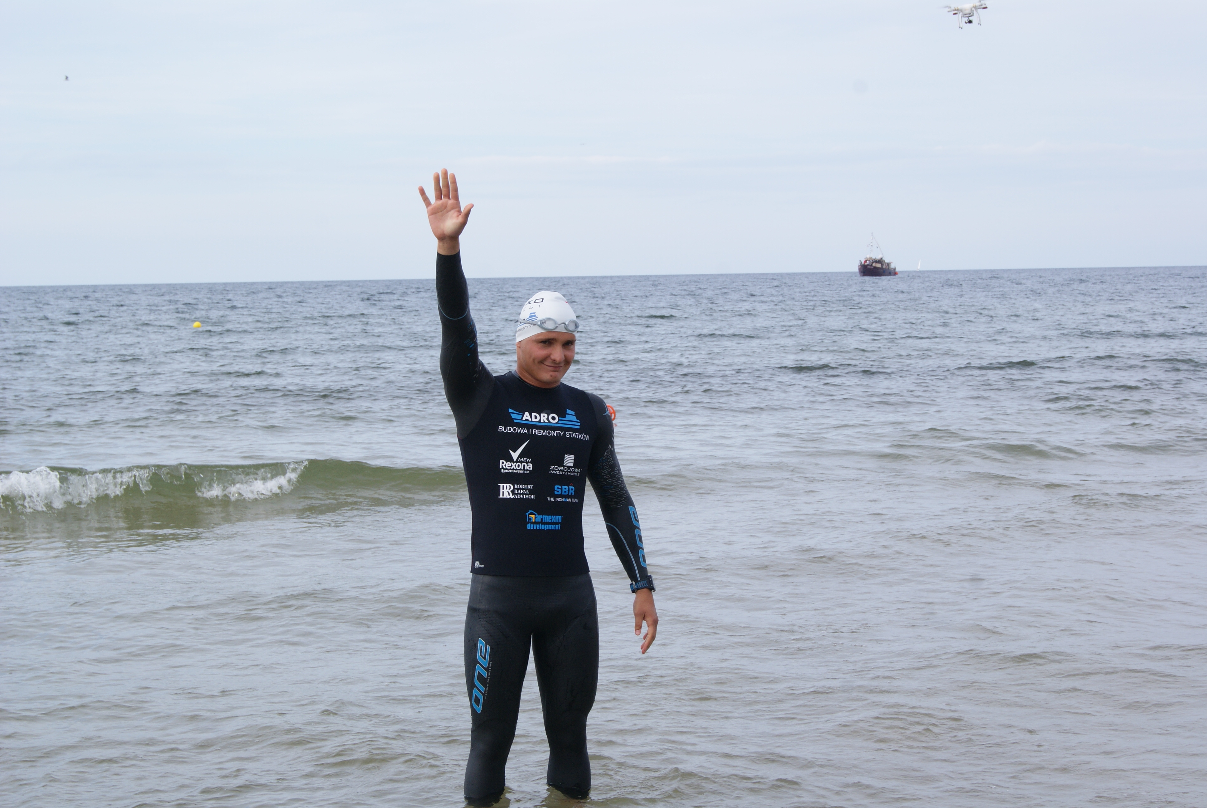 Sebastian Karaś na plaży w Kołobrzegu, tuż przed podjęciem pierwszej próby przepłynięcia 100 km wpław przez Morze Bałtyckie.